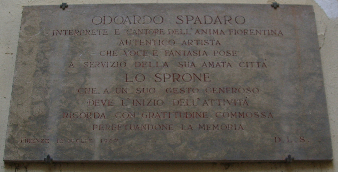 Piazza del giglio, targa odoardo spadaro